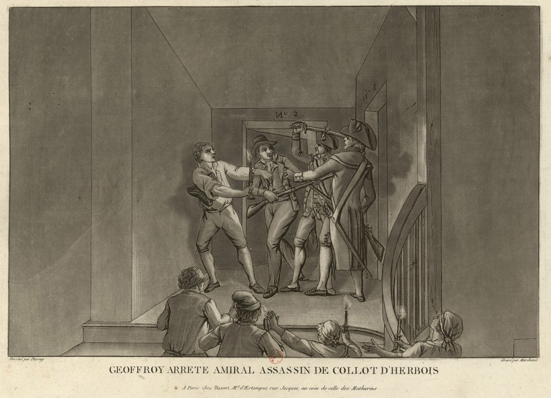 Arrestation de Henri Ladmiral à la suite de sa tentative d'assassinat de Jean-Marie Collot d'Herbois (estampe).